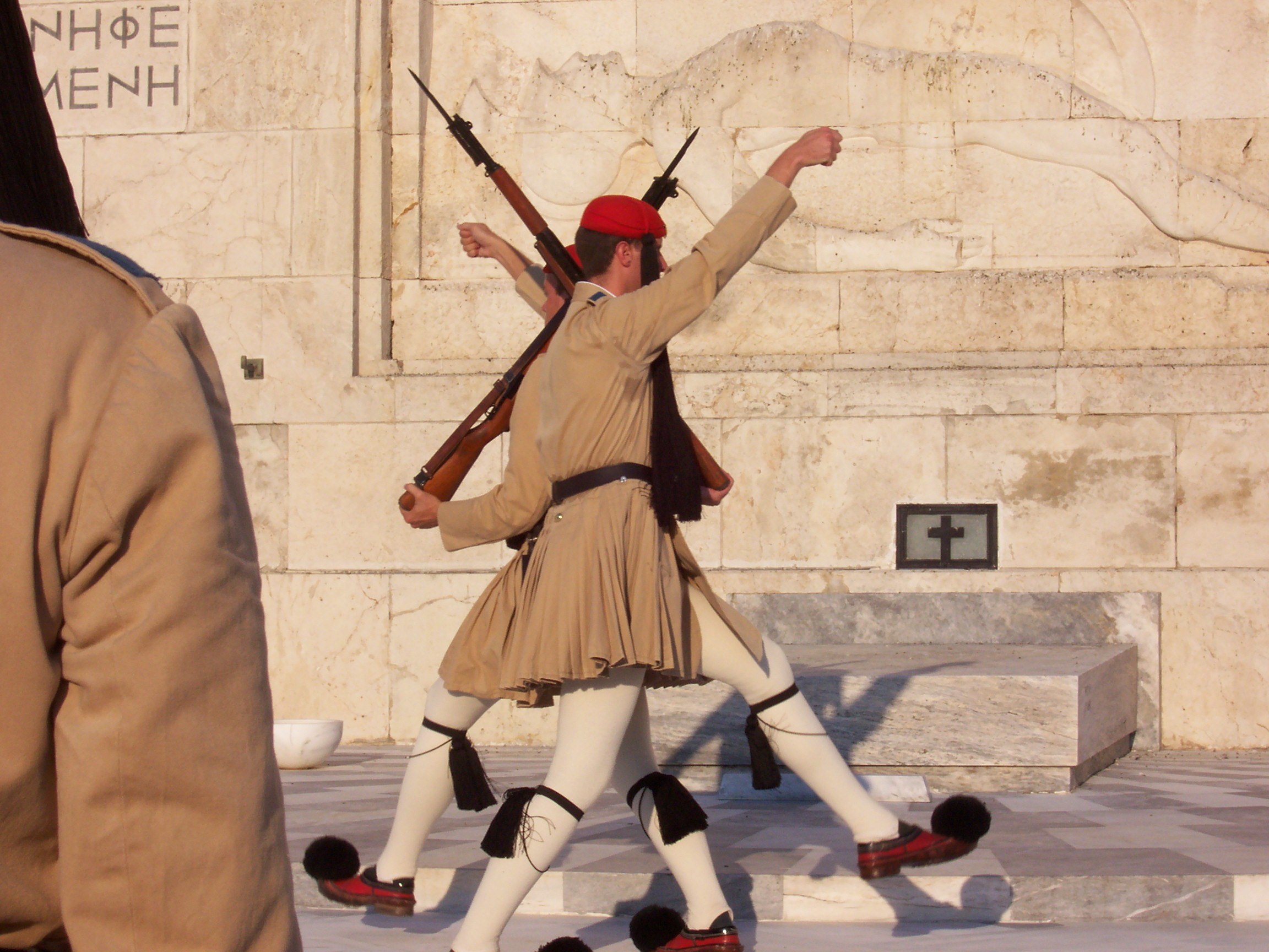 cambio della guardia-Atene del parlamento